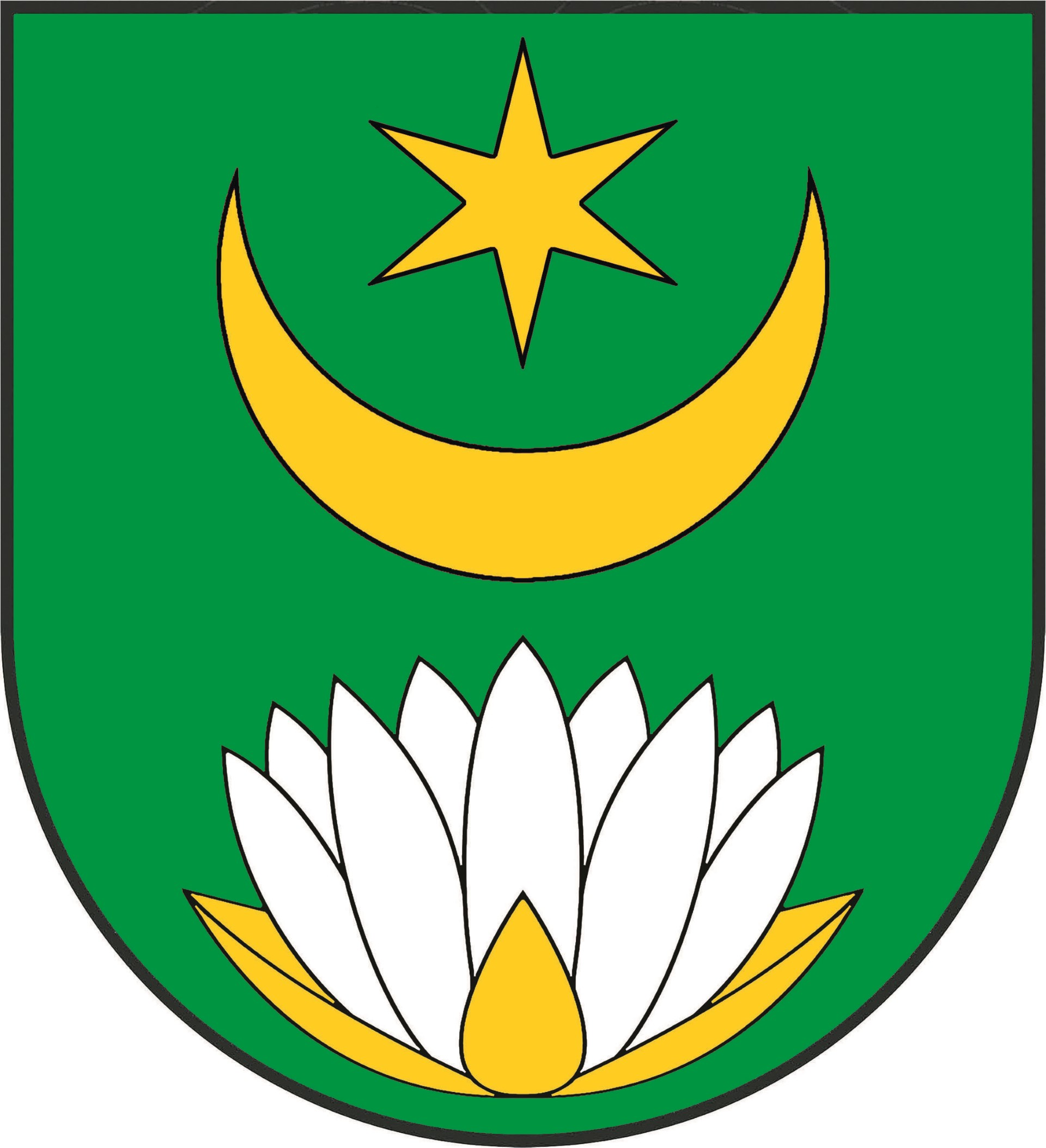 Herb gminy Ostrów.